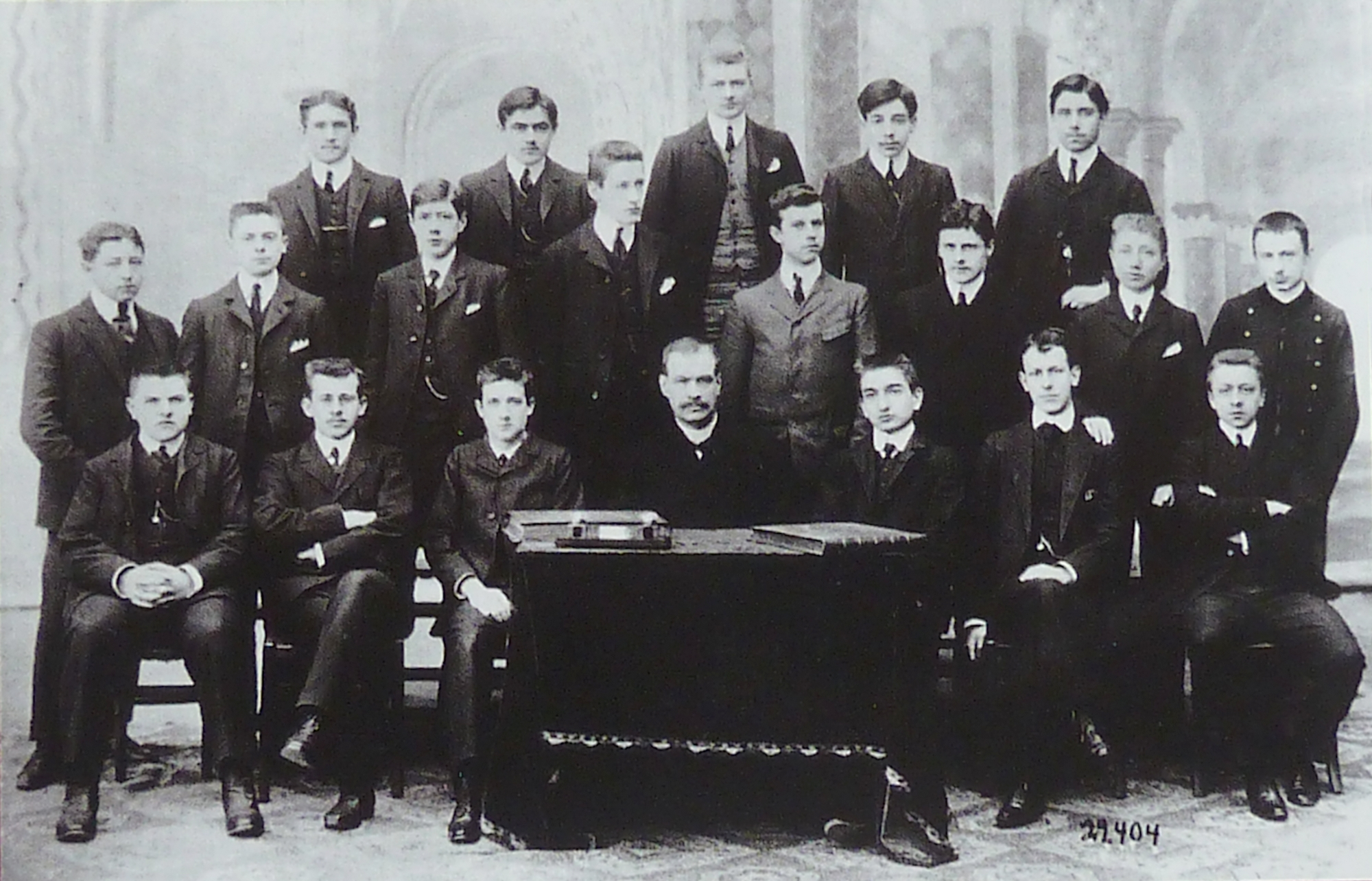 Photo de classe, année de rhétorique (1ère), 1905. Charles de Gaulle (2ème rangée 3ème à gauche). Le professeur est son père, collège Stanislas, Paris. - Photographe non déterminé, archives De Gaulle/Giraudon